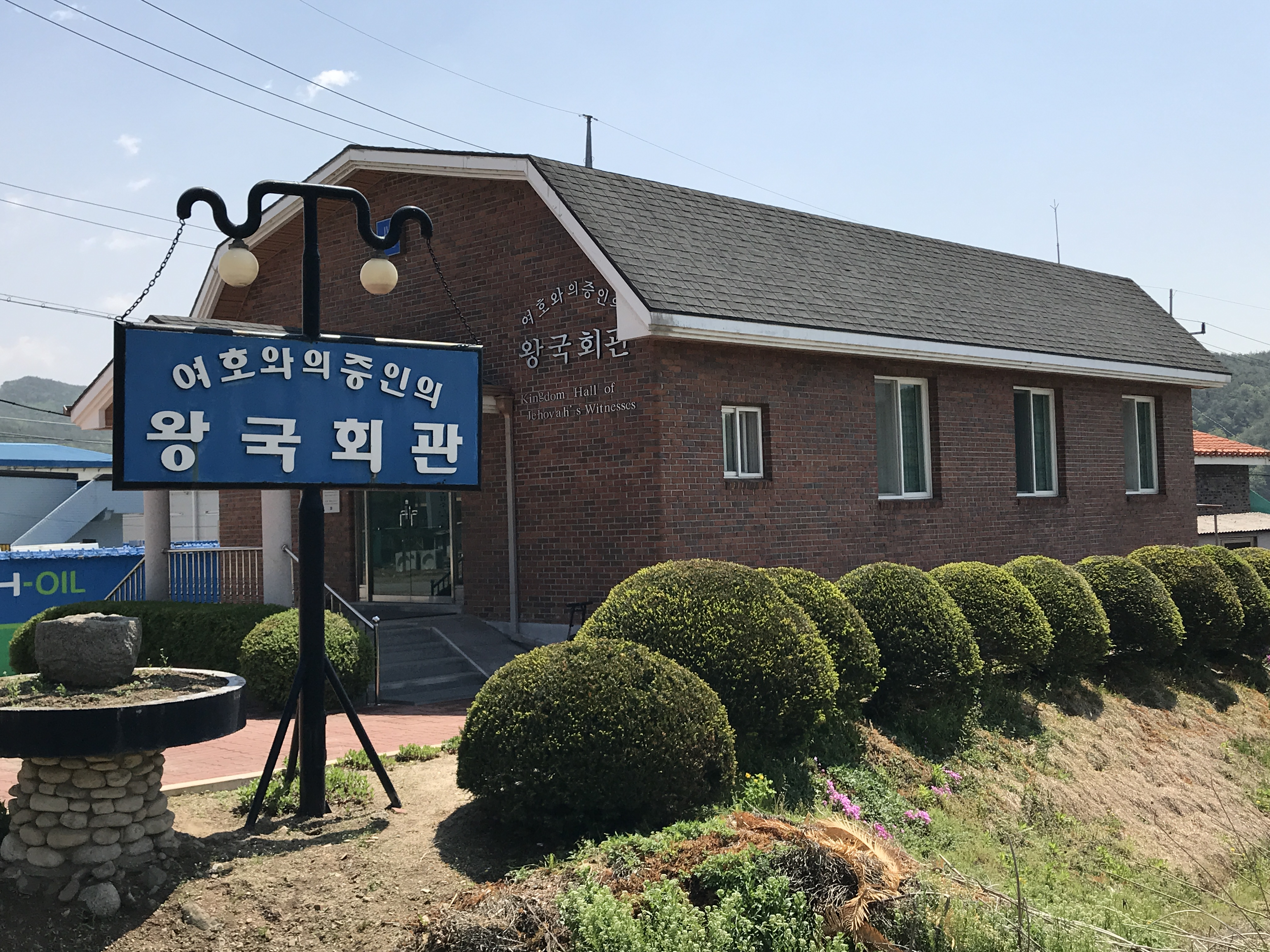 여호와의증인청일왕국회관(강원도 횡성군 갑천면 청정로 836)